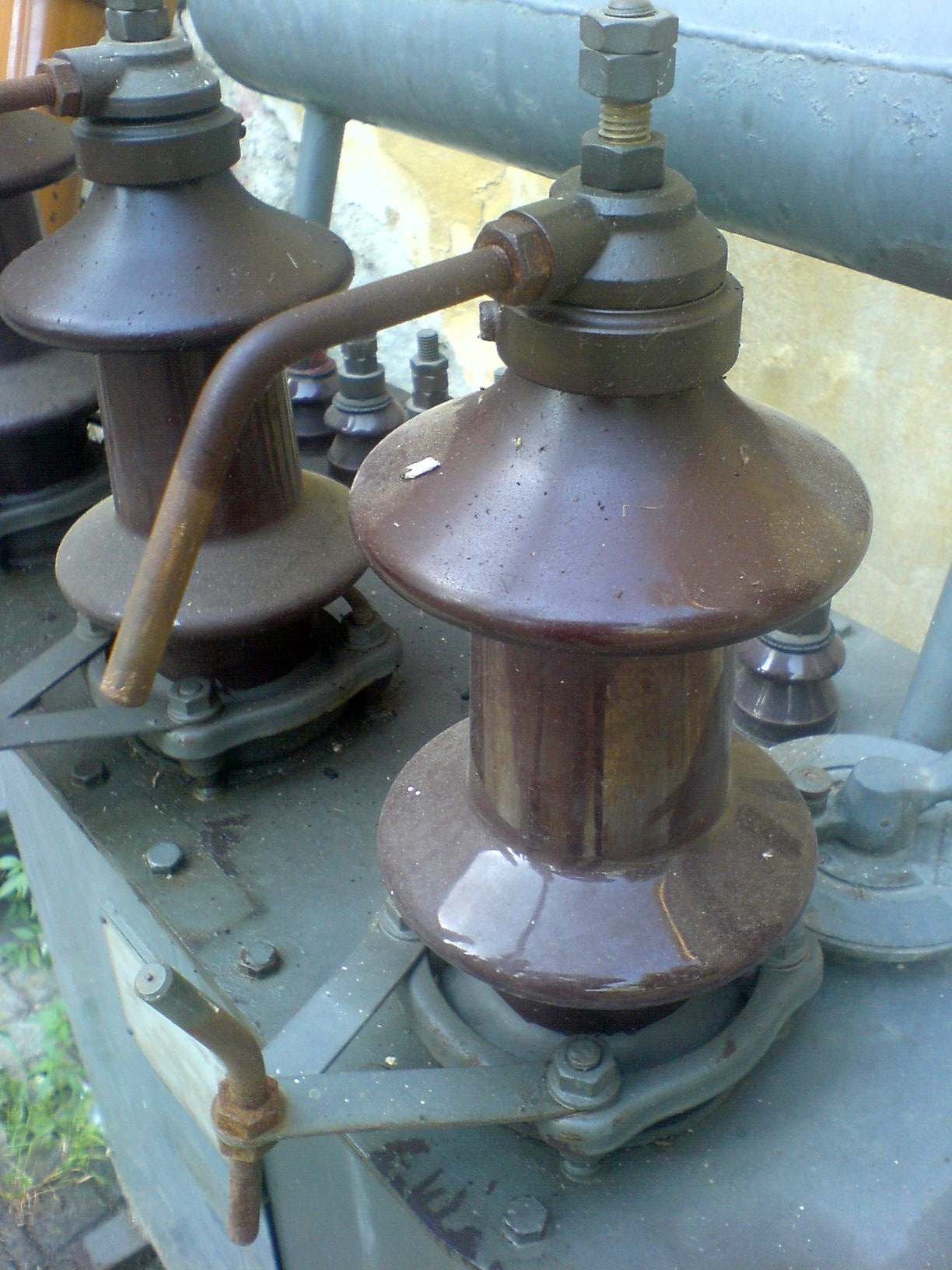 Trasformatore tipo TSA